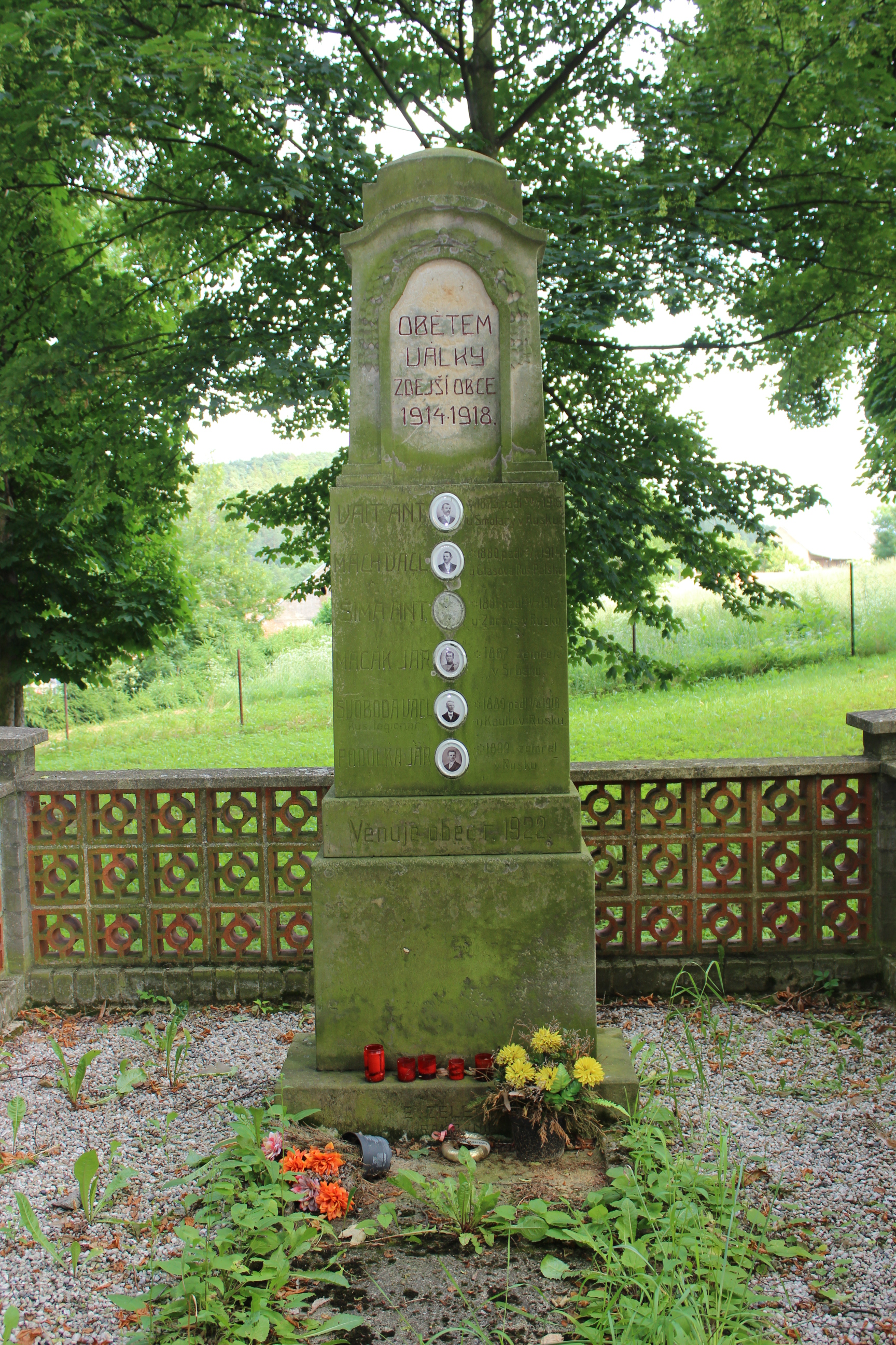 Pomník padlým za první světové války v Tytrech.